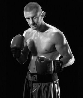 Tomasz Adamek - polski bokser, mistrz świata